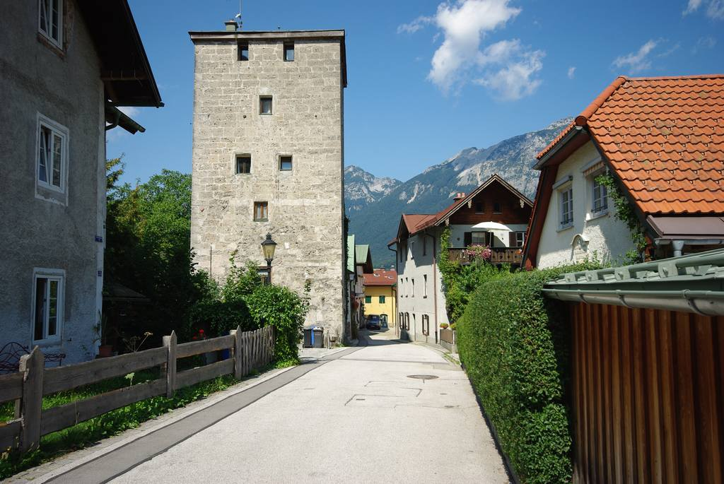 Peter-und-Paul-Gasse in 83435 Bad Reichenhall